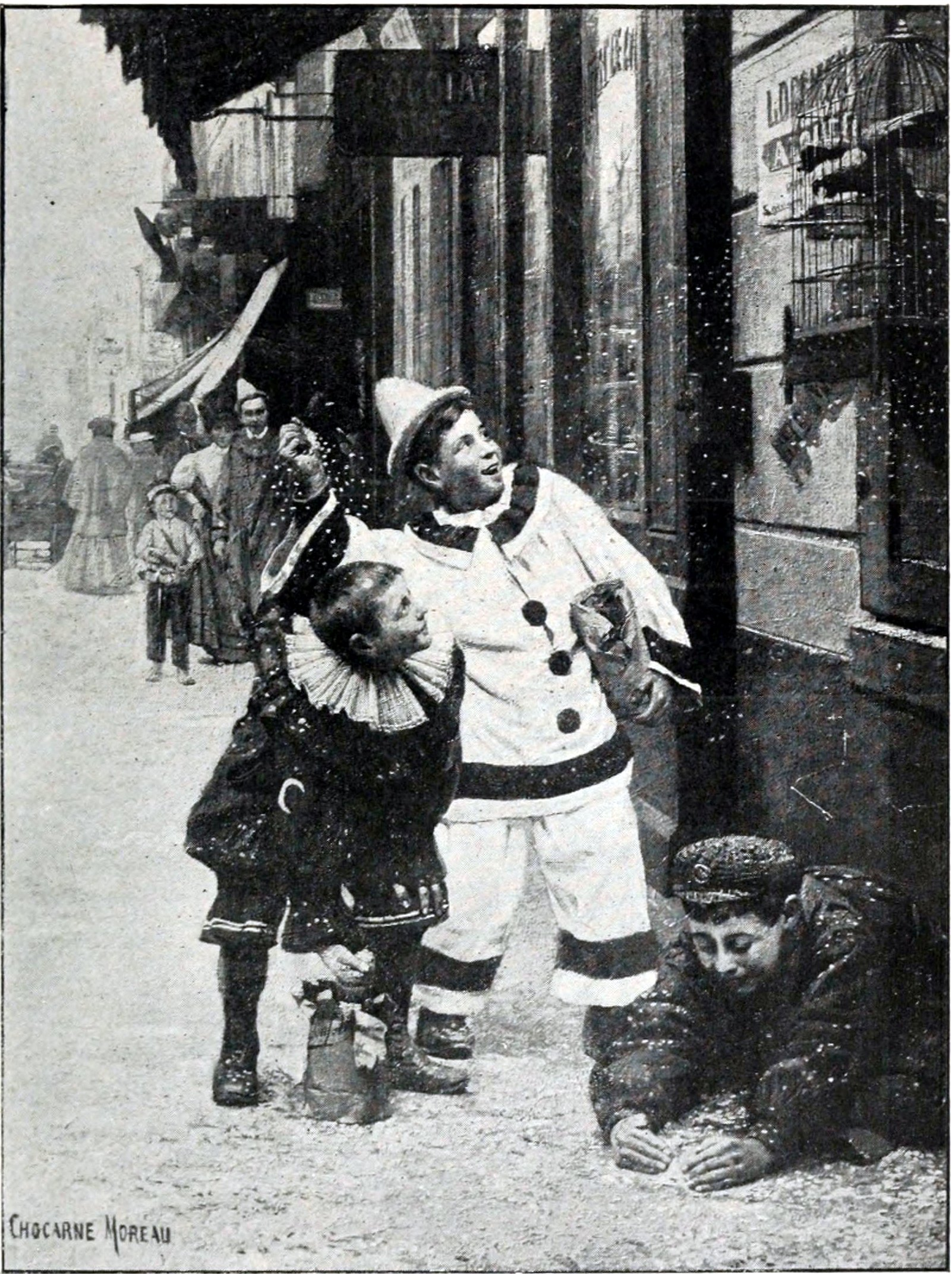 Mi-Carême